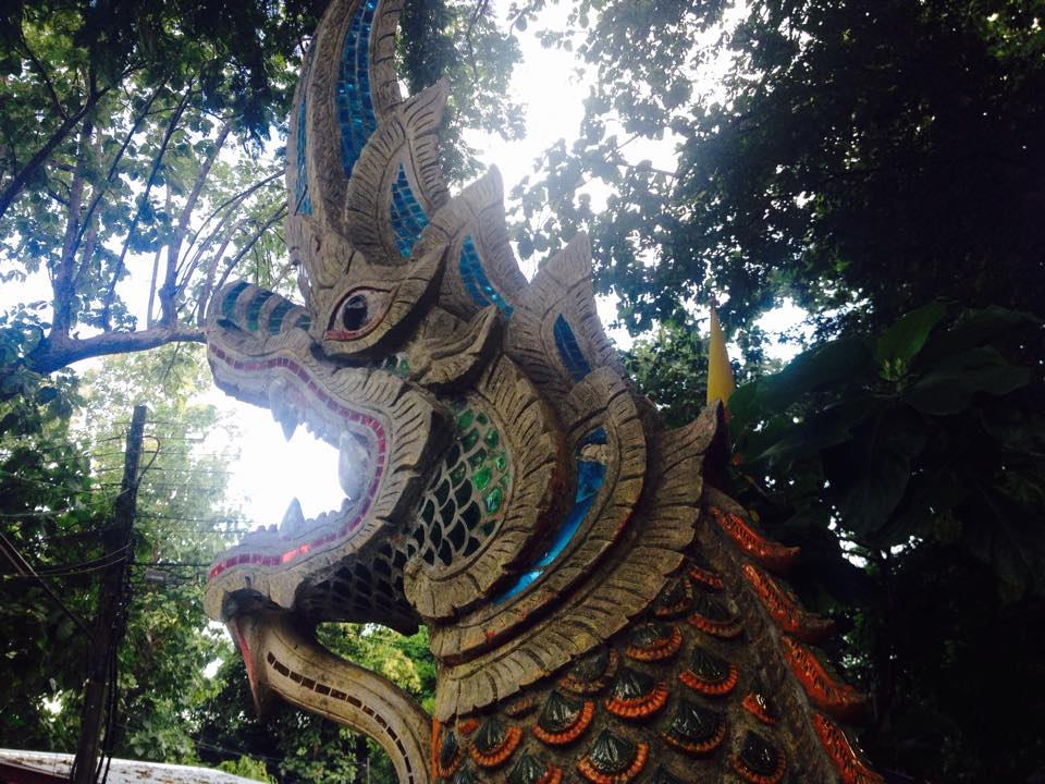 พญานาค(บันไดนาค)วัดป่าแดง